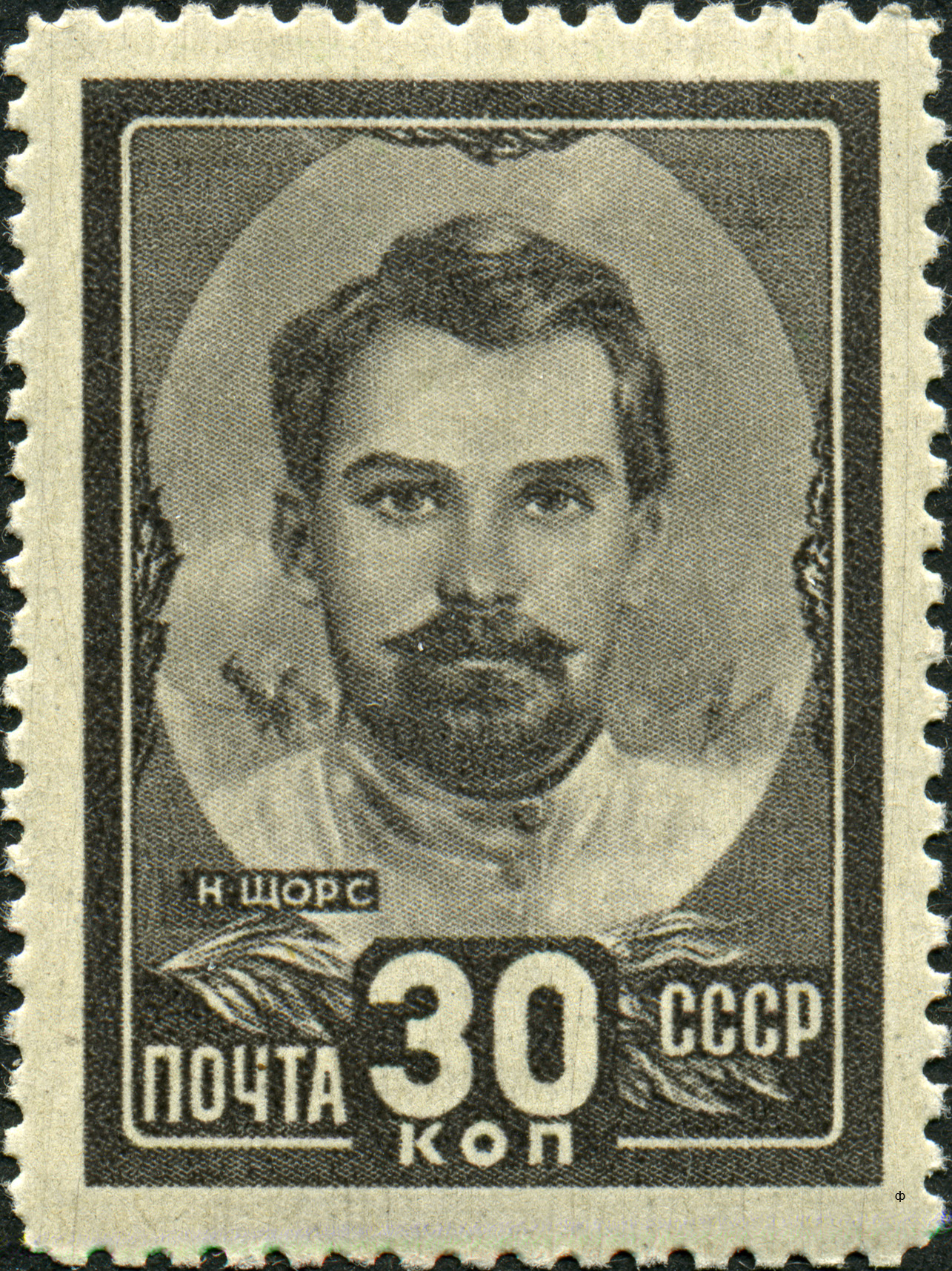 Марка СССР